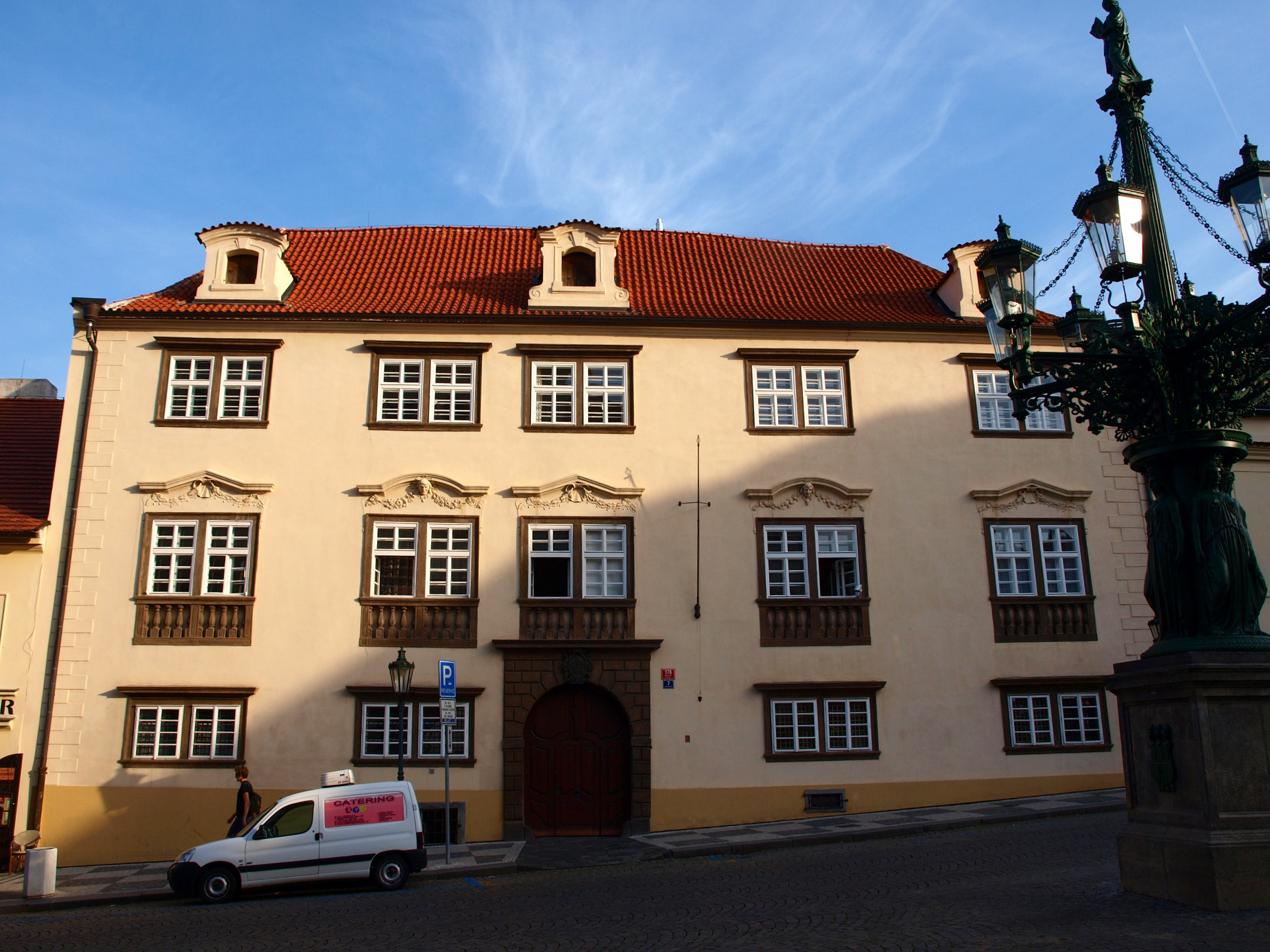 Dietrichtejnský palác (Hradčany)